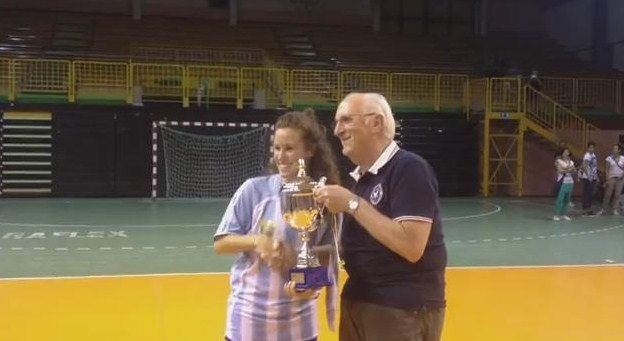 Claudia Catena, capitano del Città di Falconara sta per alzare la Supercoppa Marche 2013